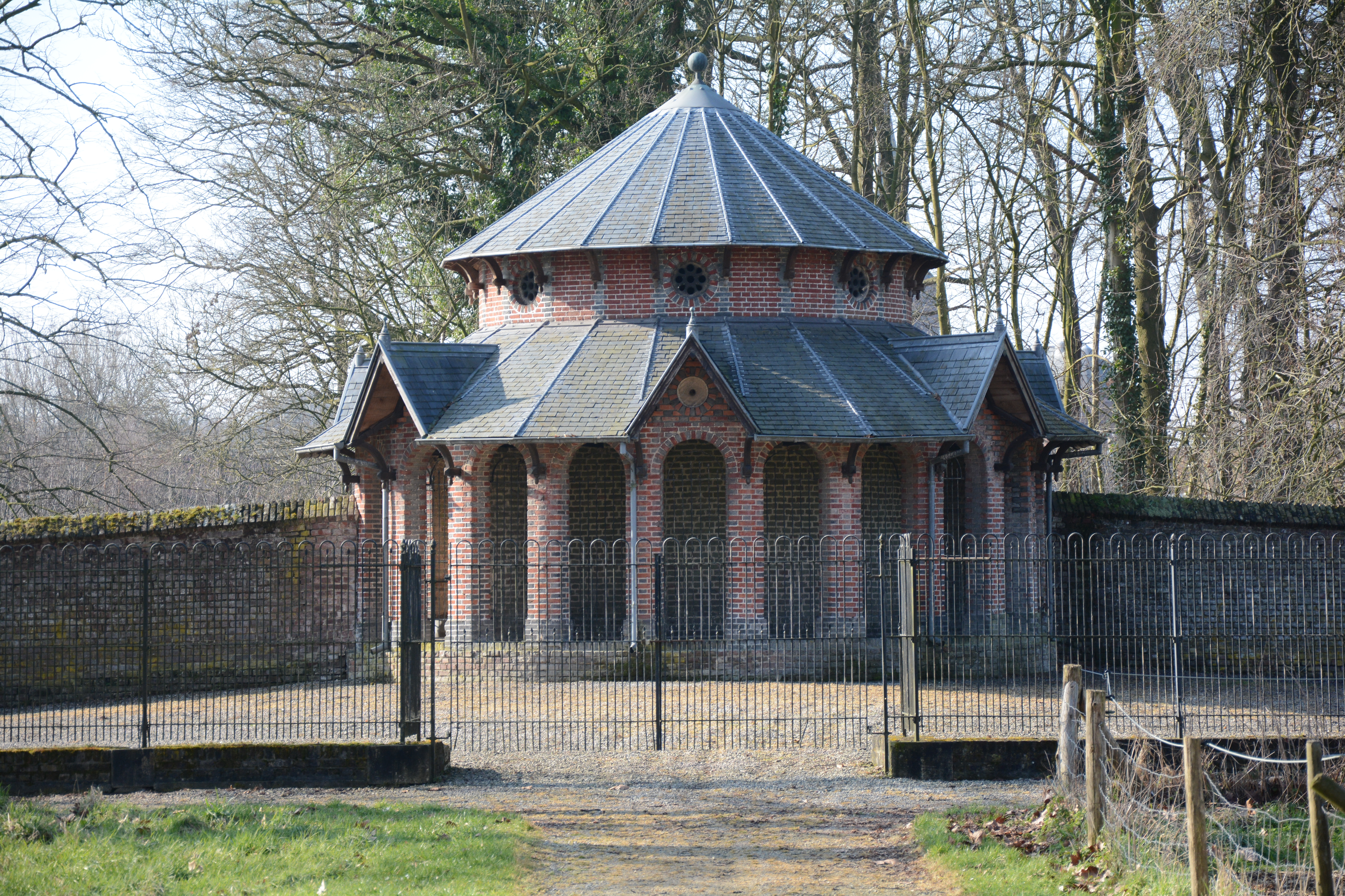 Hondenkennels Kasteel van Poeke